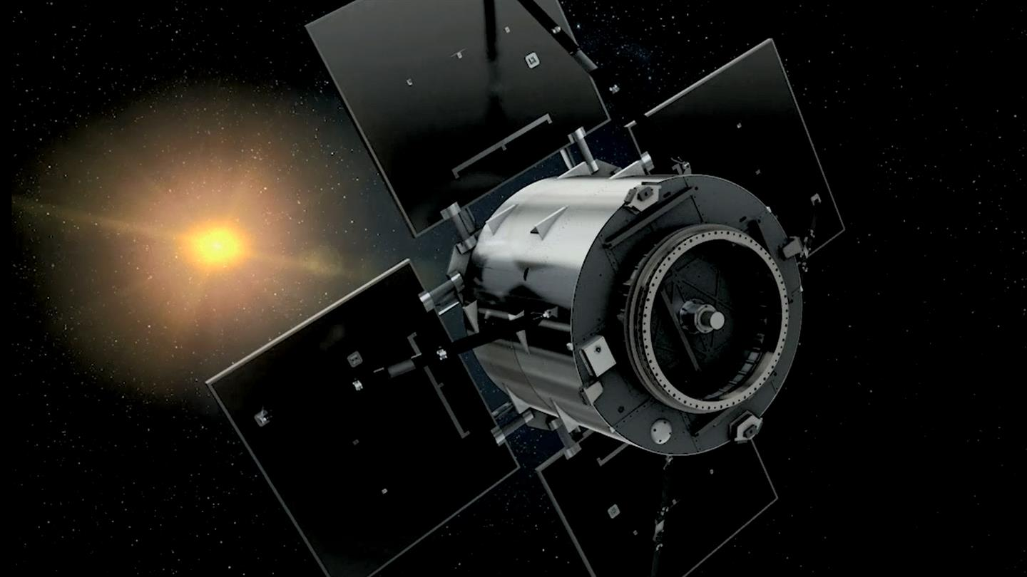 künstlerische Darstellung des DLR-Satelliten Eu:CROPIS